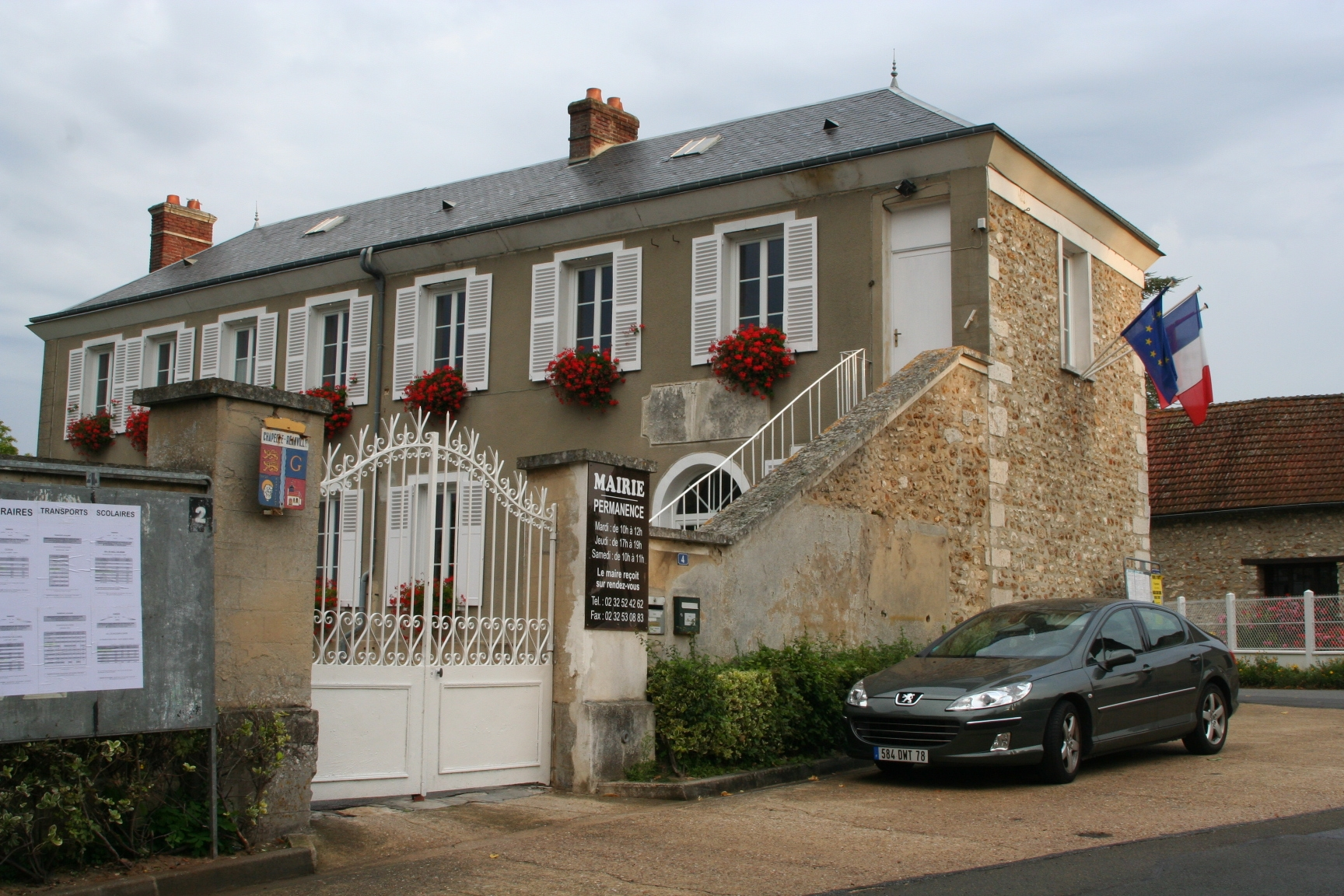 mairie de La Chapelle-Réanville - Eure (France)